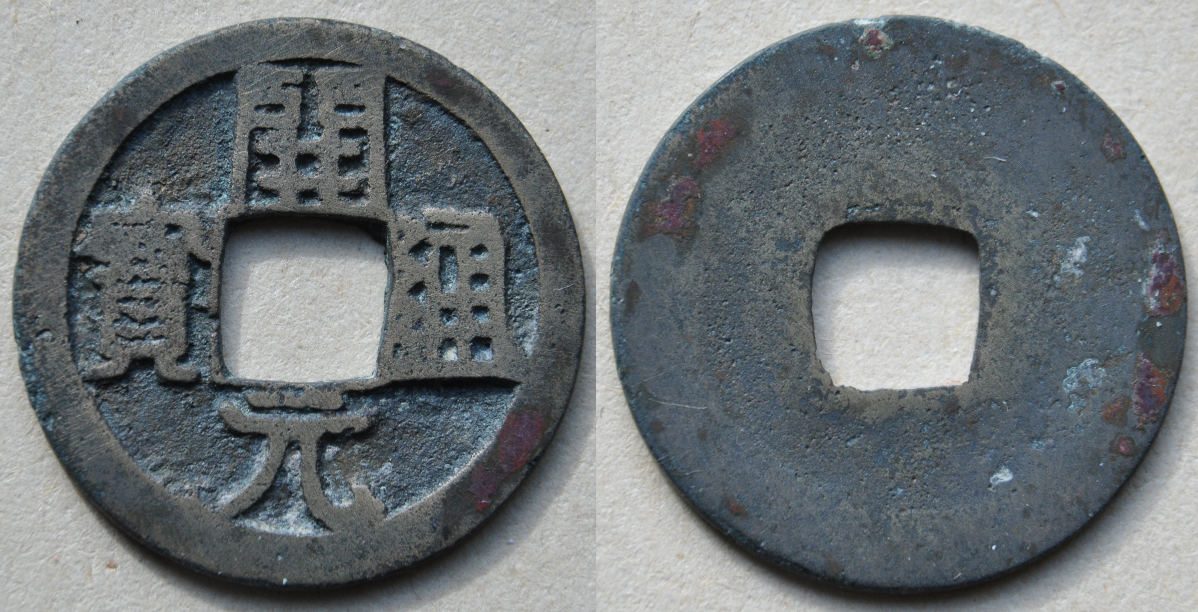 S281 : A/ Kaiyuan tongbao R/ vide Dimension : 24.5 mm Poids : 4.1 g. Bronze Type III B Attribué au règne de Xuanzong (712-756) à partir de 732. Dyn astie Tang.